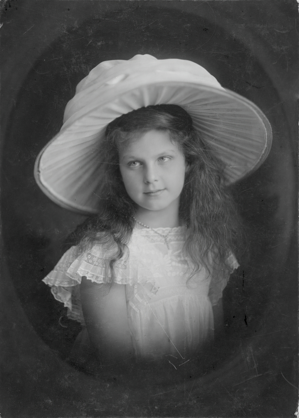 Maria Antonia, Erzherzogin von Österreich-Toskana (1899 - 1977).